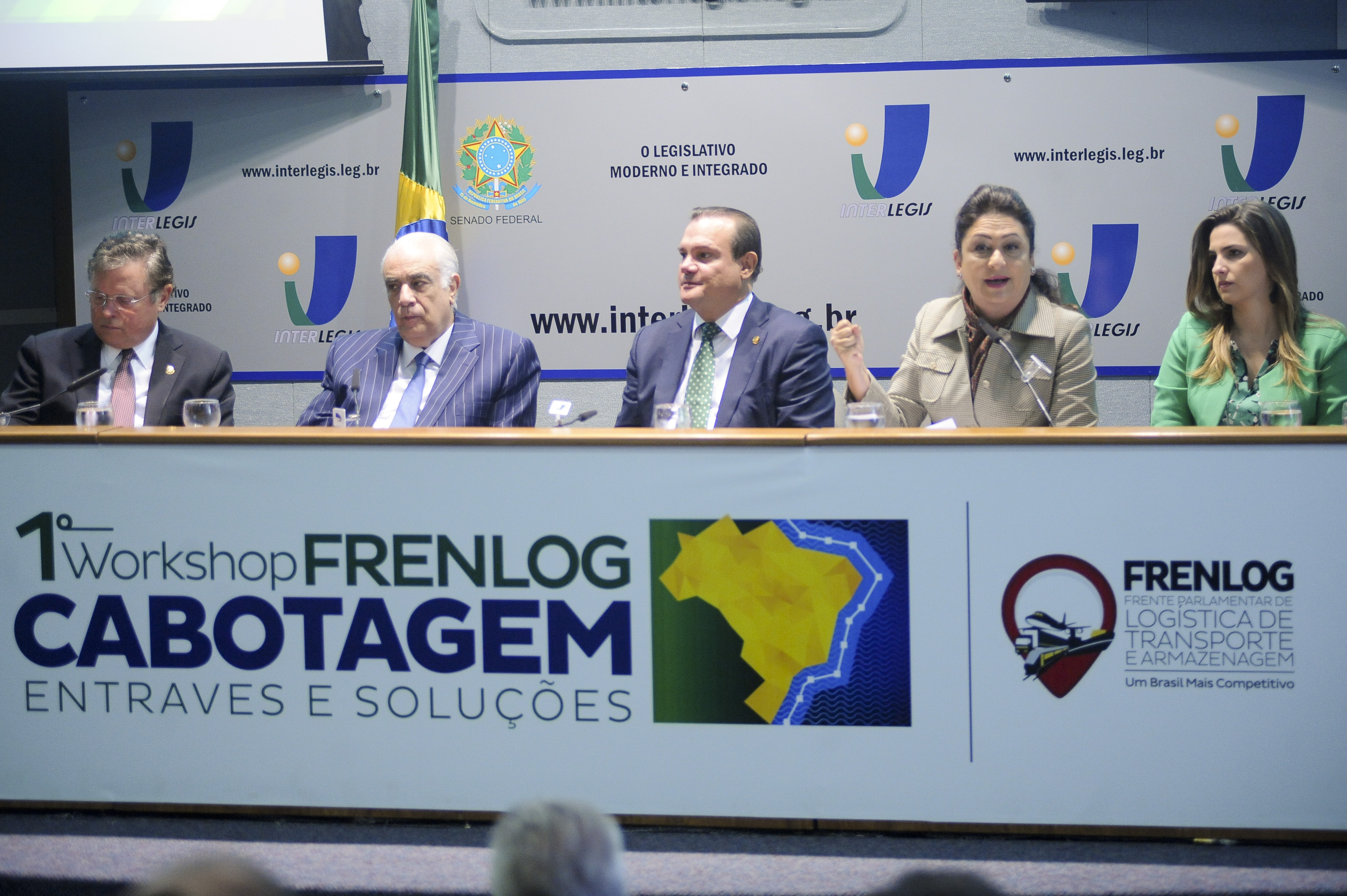 A Frente Parlamentar Mista de Logística de Transporte e Armazenagem (Frenlog) realiza o 1º Workshop sobre Cabotagem. O workshop promove a discussão entre instituições governamentais, privadas e sociedade sobre ações que fomentem esse tipo de navegação. A revisão das normas legais e elaboração de nova regulamentação para a cabotagem também serão discutidas. Participam: presidente da Frenlog, senador Wellington Fagundes (PR-MT); senador Blairo Maggi (PR-MT); ministro dos Transportes, Antônio Carlos Rodrigues; ministra da Agricultura, Kátia Abreu Foto: Pedro França/Agência Senado